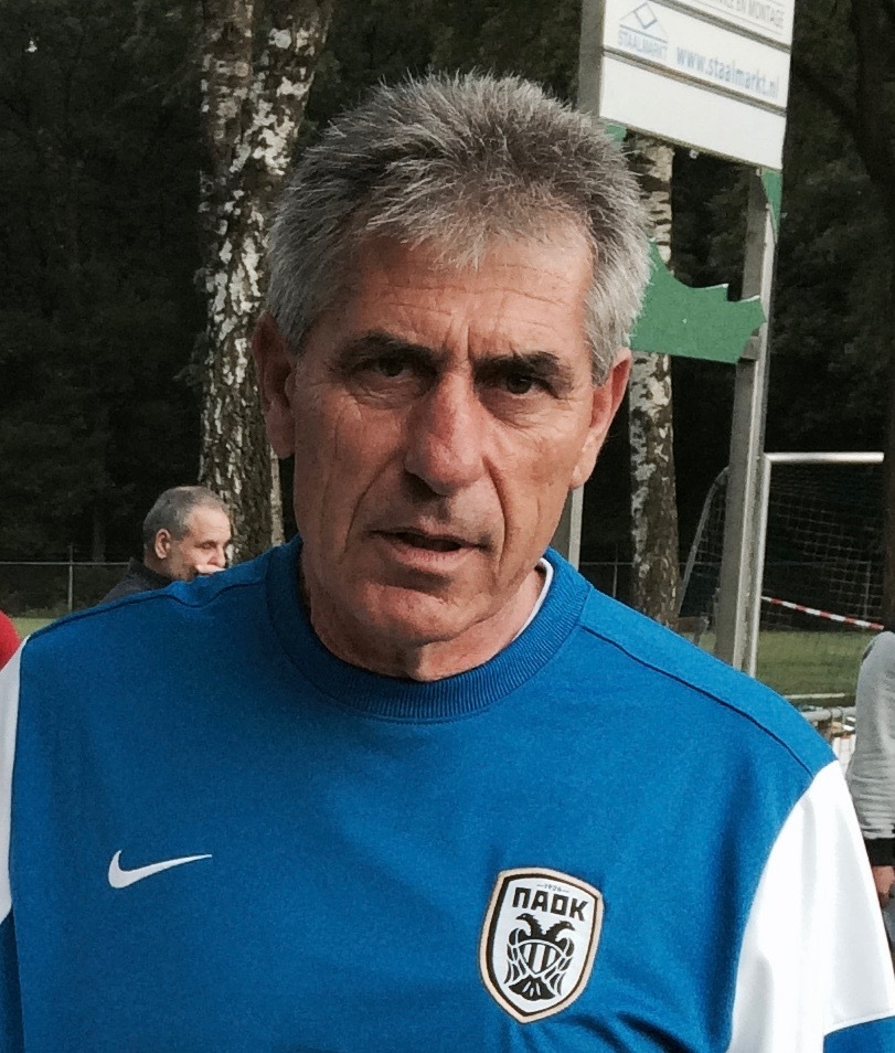 Trainer Angelos Anstasiadis im Jahr 2014 im Trainingslager in Osterbeek